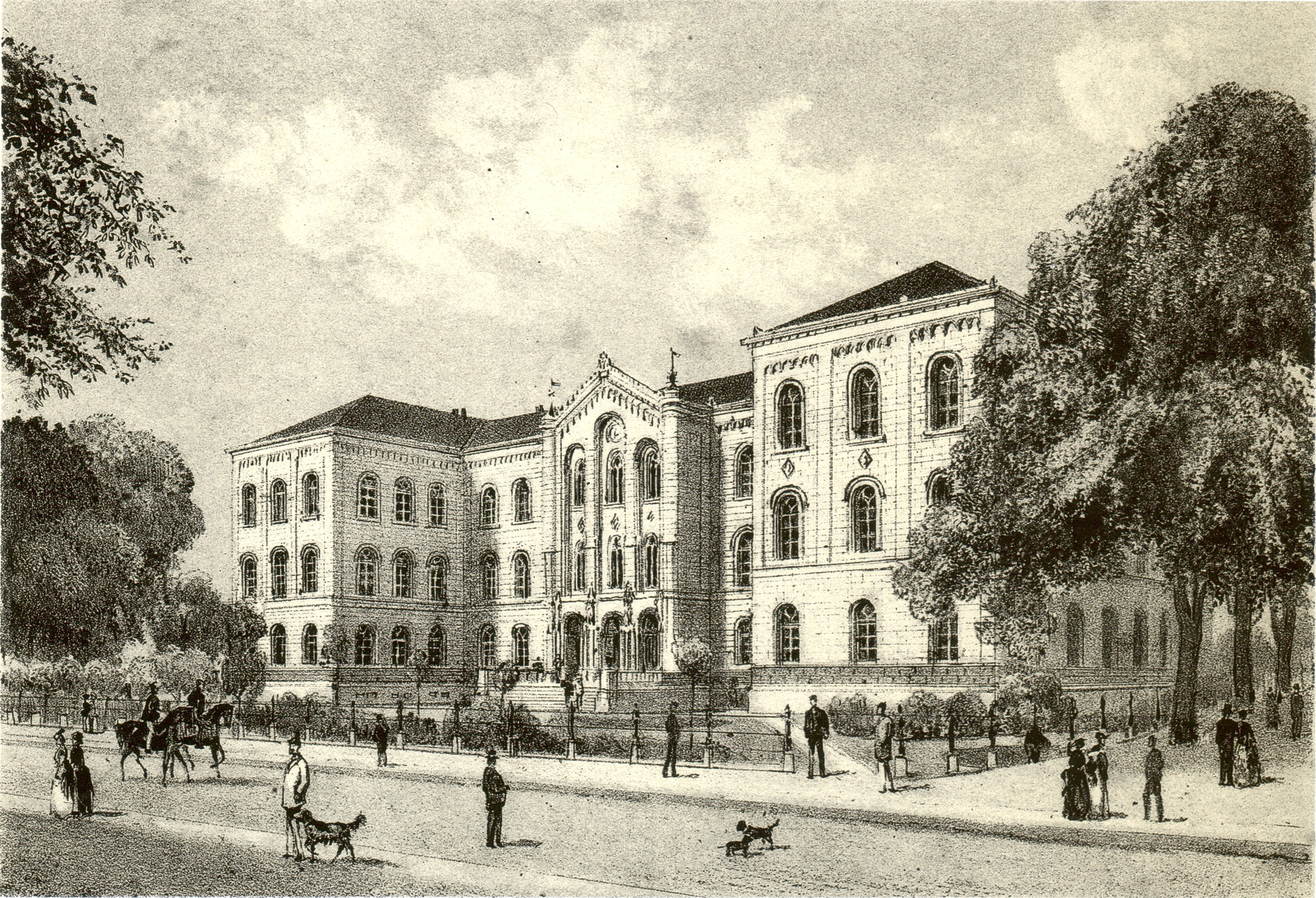 Altes Auditorium Maximum der Georg-August-Universität Göttingen. Vorne die Weender Straße, ganz rechts der Wallaufgang. Lithographie